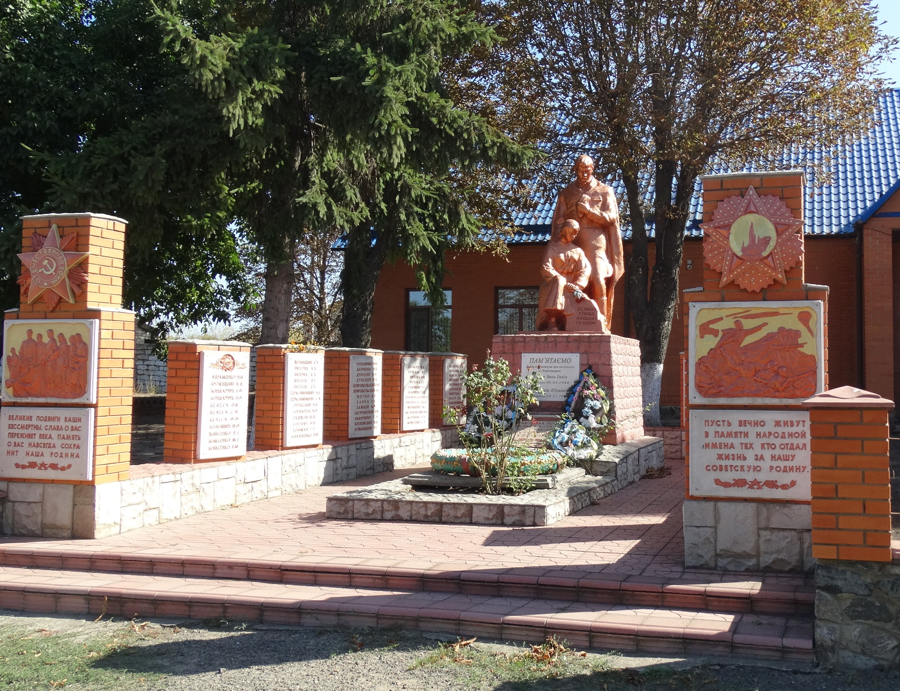 Братська могила 11 радянських воїнів та рядового Кучер Я. Є., загиблих при звільненні села в квітні 1944 року